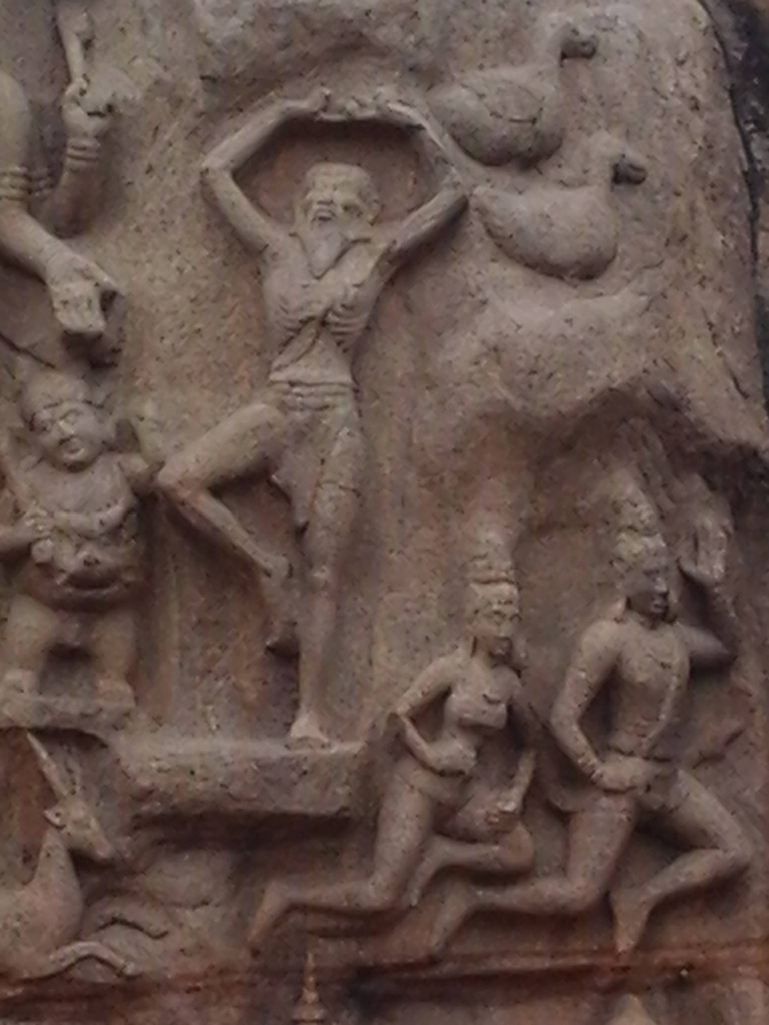 மாமல்ல பாறைச்சிறபங்களில் ஒன்றான பகீரதன் தவம் செய்யும் சிற்பம்.